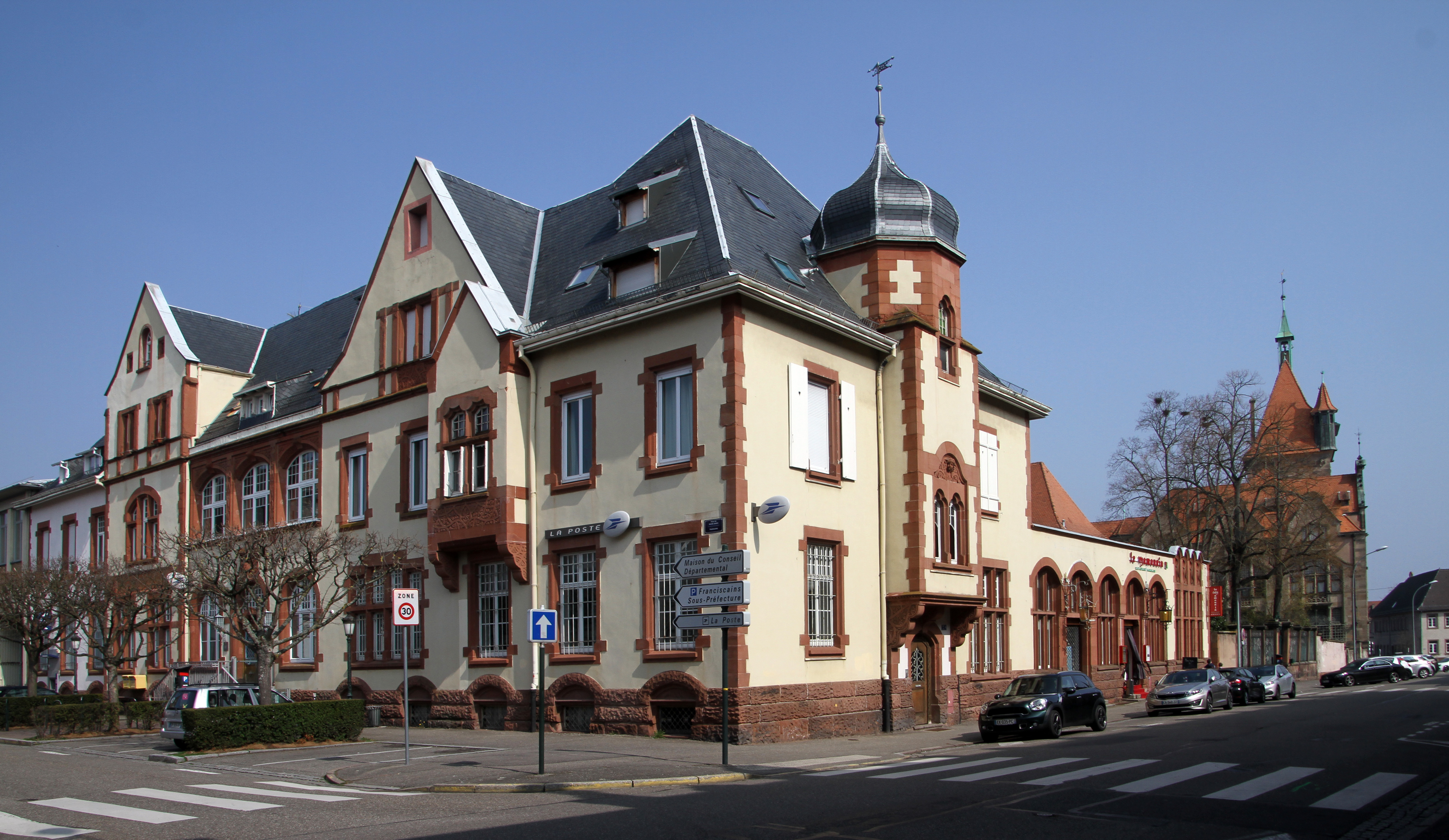 Hagenau